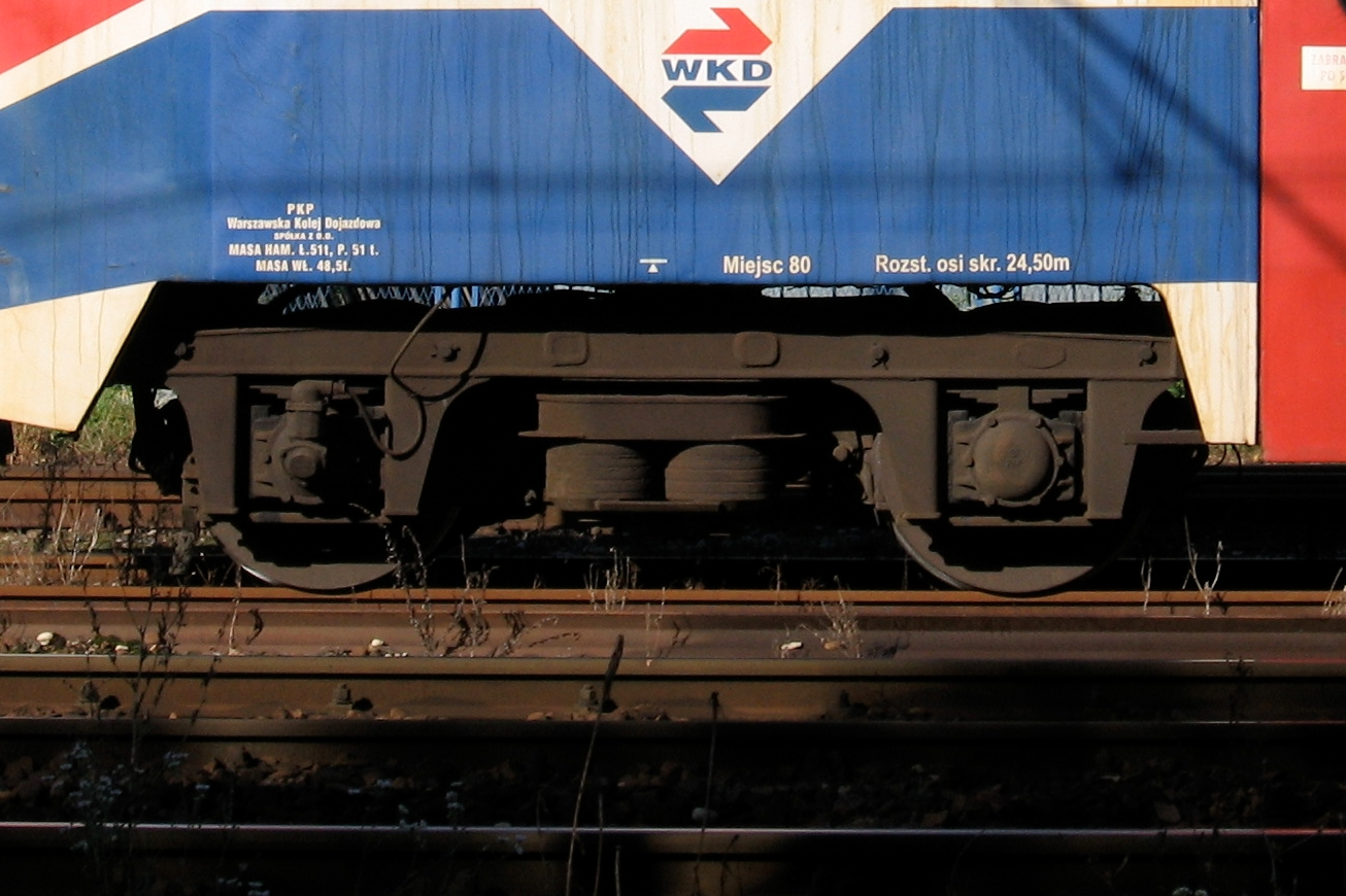 Wózek napędny elektrycznego zespołu trakcyjnego EN94-26.